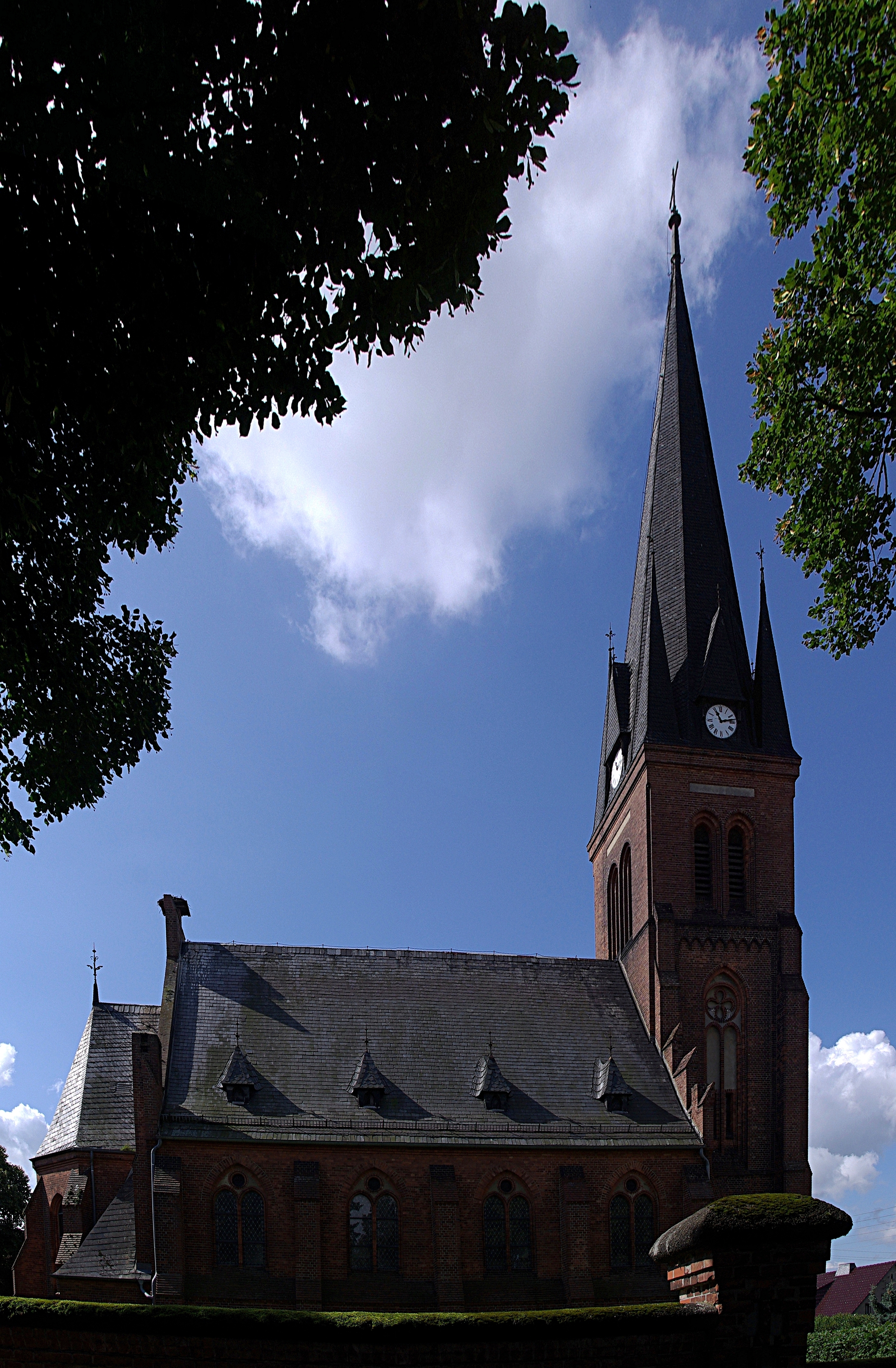 Bad Freienwald in Brandenburg. Die Kirche im Ortsteil Bralitz steht unter Denkmalschutz.